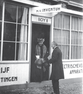 Koningin Wilhelmina op bezoek